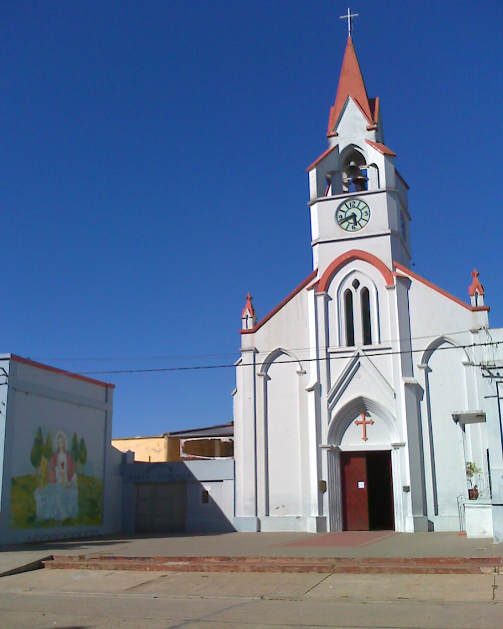 Iglesia